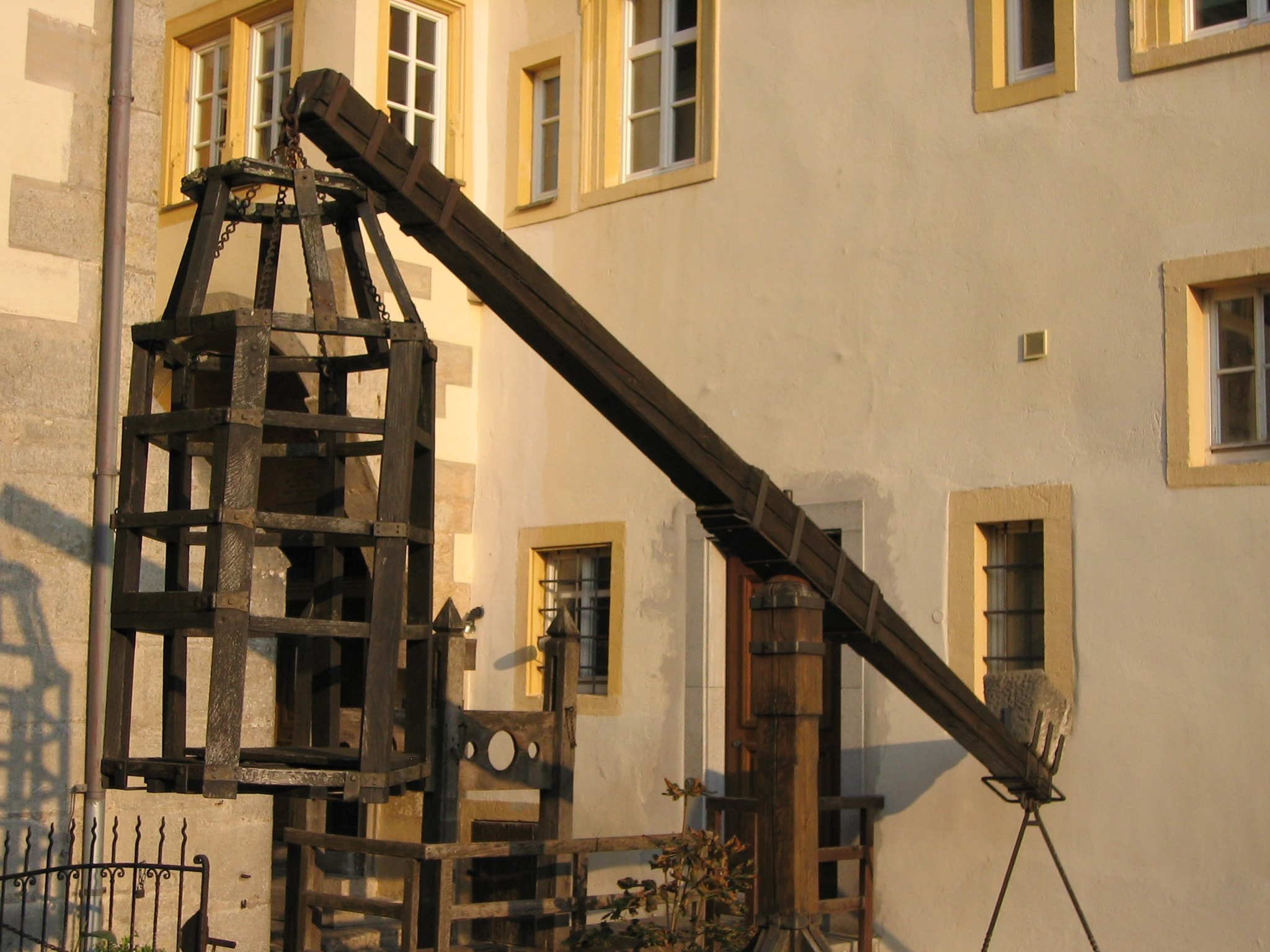 Mittelalterliches Kriminalmuseum Rothenburg ob der Tauber